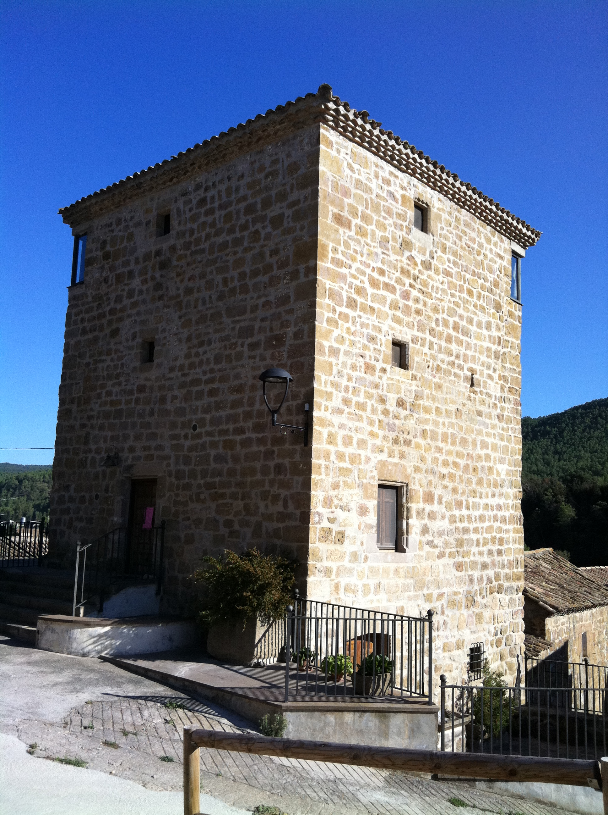 Torres Antigues - Torres d'Ogern